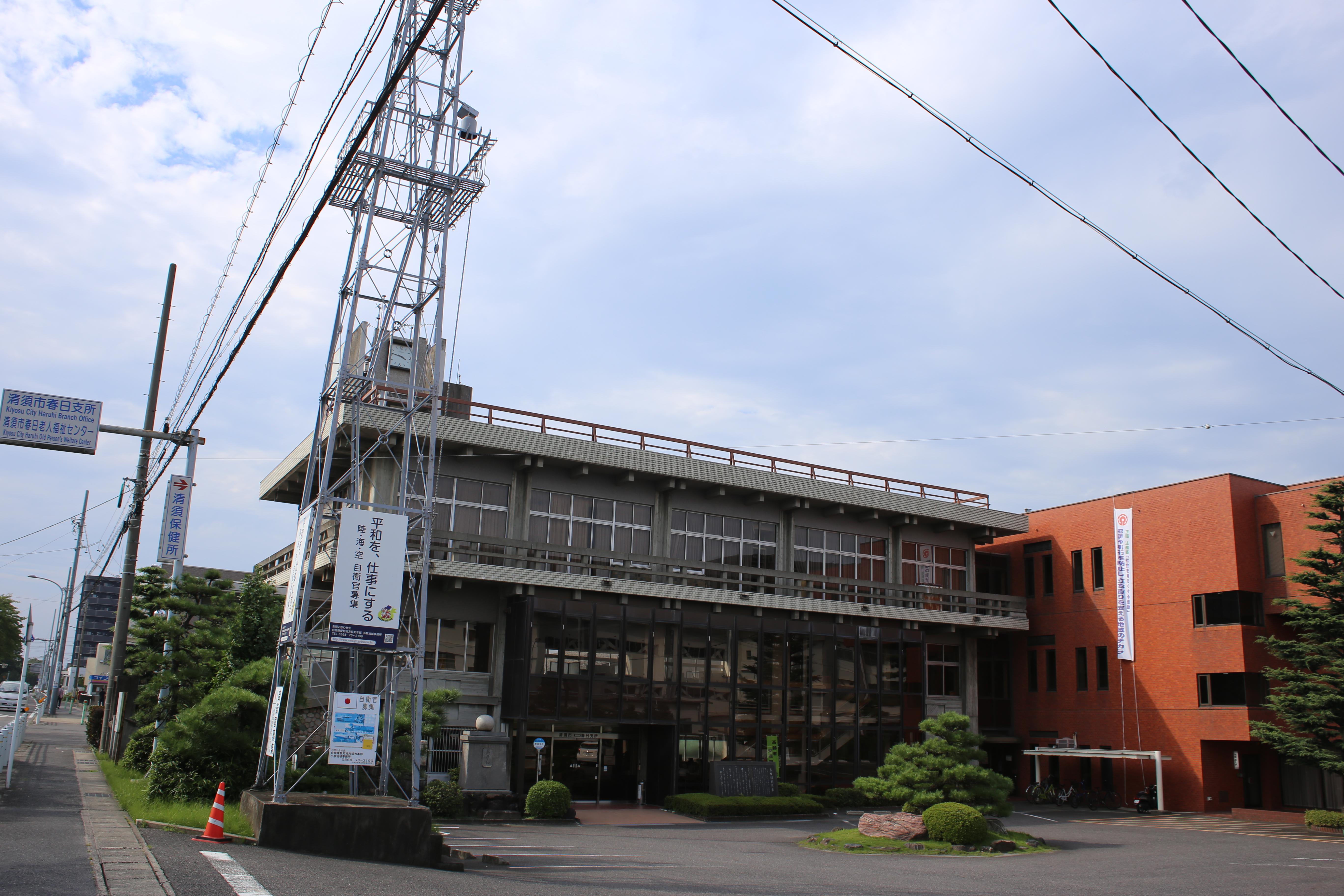 清須市役所春日庁舎（旧春日町役場）